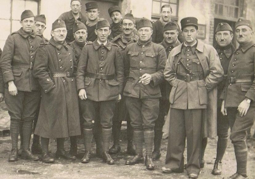 Durant la drôle de guerre, dans le Nord de la France, le jeune lieutenant d'infanterie André Payan - cigarette aux lèvres - avec quelques uns de ses hommes.